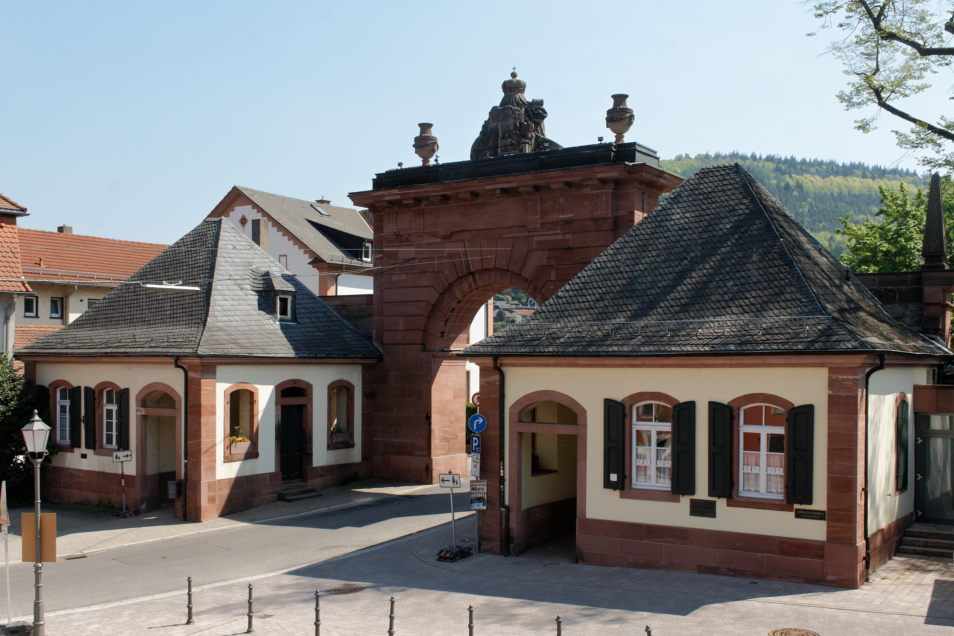 Stadttor von Neckargemünd (Baden), erbaut 1788 als Ehrentor für Kurfürst Karl Theodor.